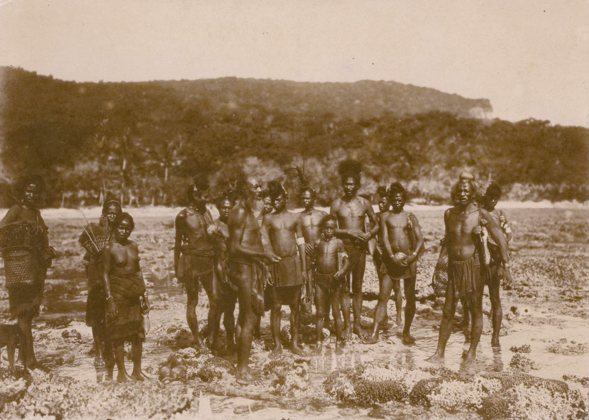 Fataluku auf einem Riff an der Ostküste von Tutuala (Timor)